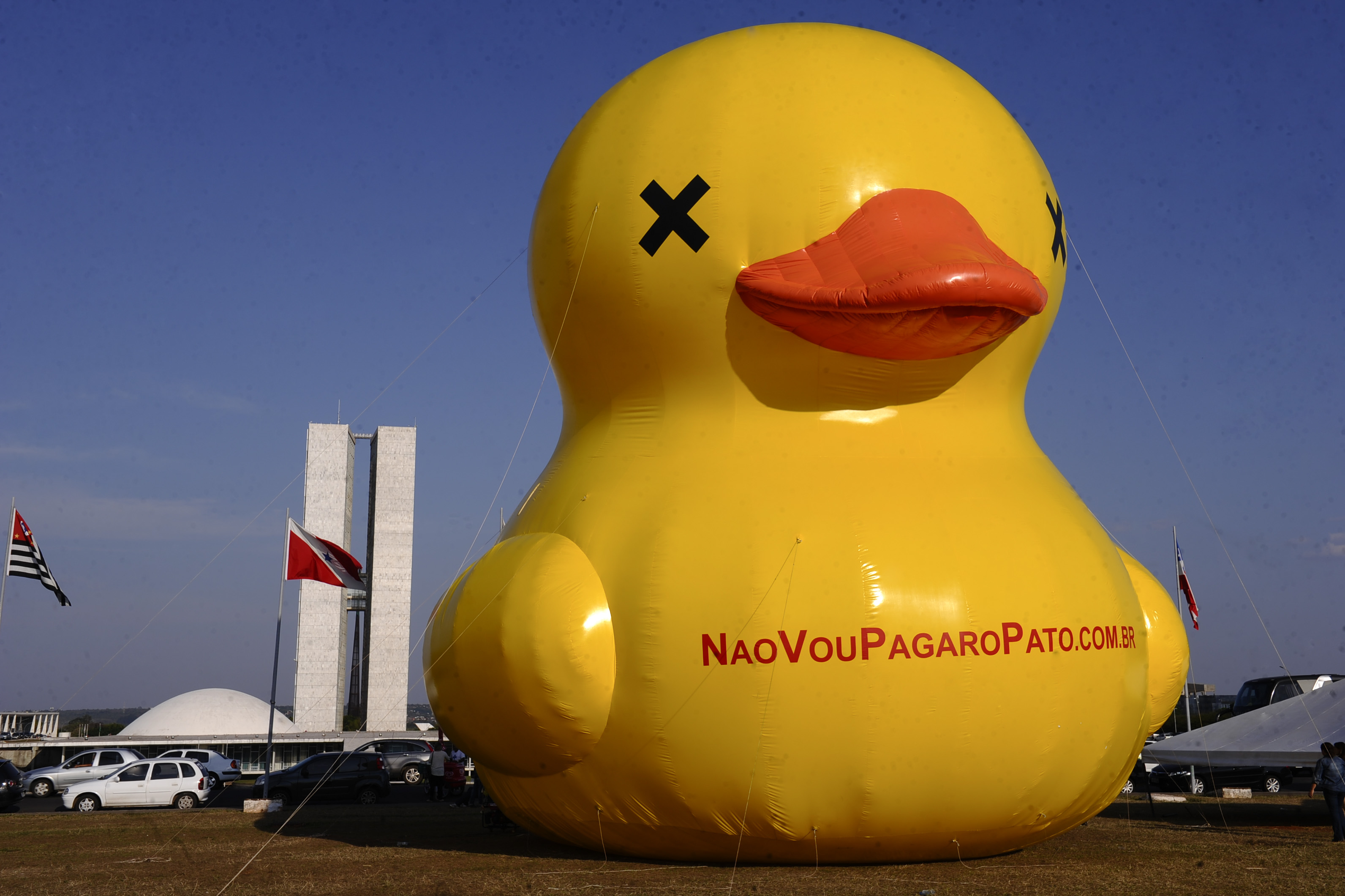 Contra aumento de impostos e CPMF, Fiesp pÃµe pato inflÃ¡vel na Esplanada dos MinistÃ©rios. A FederaÃ§Ã£o das IndÃºstrias de SÃ£o Paulo instalou nesta quinta-feira (1Âº) um pato inflÃ¡vel de 12 metros de altura no canteiro central da Esplanada dos MinistÃ©rios, em frente ao Congresso Nacional, em BrasÃ-lia, em um ato contra o aumento de impostos e a volta da CPMF. Foto: Marcos Oliveira/AgÃªncia Senado